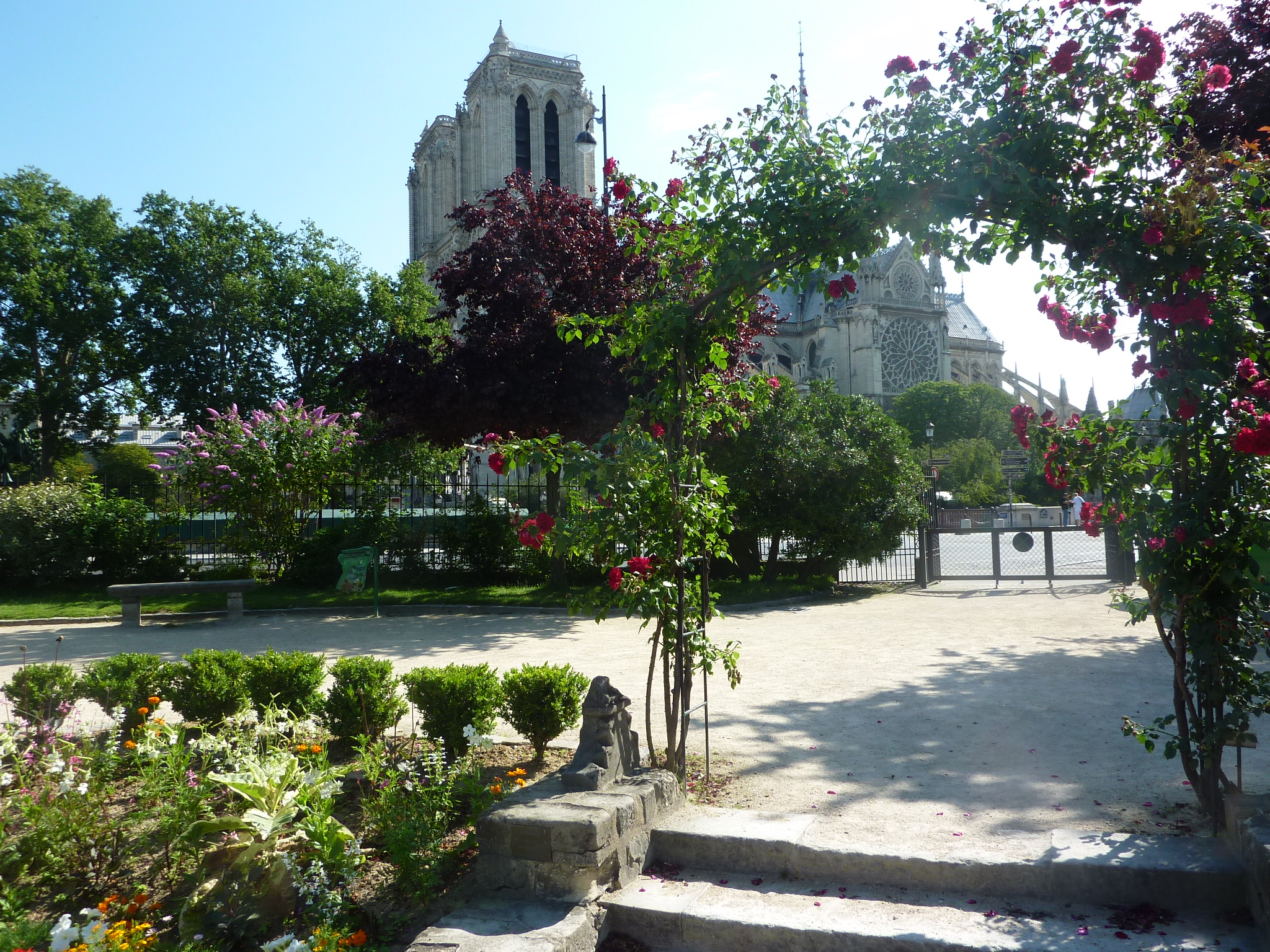 Cathédrale Notre Dame de Paris vue rive gauche .